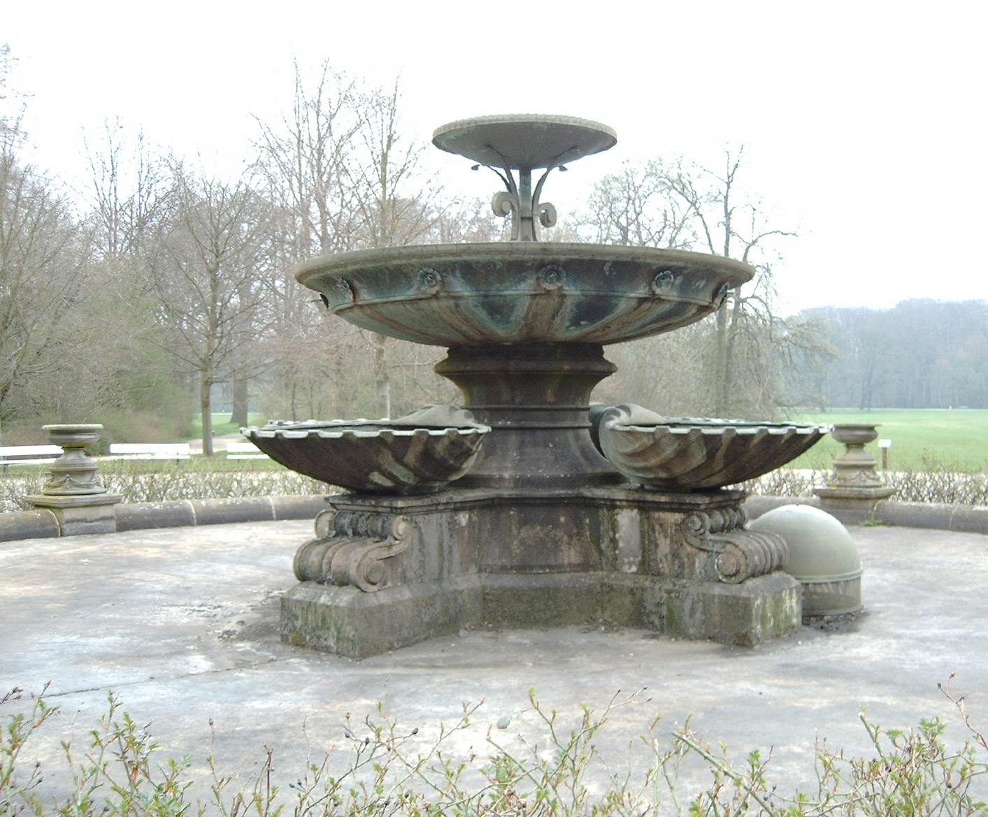 Der Marcusbrunnen in der Nähe des Parkhotels im Bürgerpark in Bremen, Deutschland. Der Brunnen wurde 1890 nach einem Entwurf von August Töpfer von dem deutschen Bildhauer Diedrich Samuel Kropp gestaltet. Nachdem die Bronzeteile 1942 für Kriegszwecke demontiert wurden, erfolgte 1959 eine Wiederinbetriebnahme des Brunnens in zunächst vereinfachter Form. 1975 wurde der Marcusbrunnen von dem deutschen Bildhauer Claus Homfeld wieder mit einer oberen Schale sowie anstelle der ursprünglichen Seepferde mit vier Muschelschalen ergänzt, die jeweils in Bronze ausgeführt wurden.